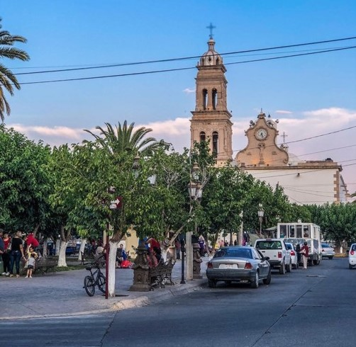 Templo de San Pablo Apóstol. ( Karen Urías )